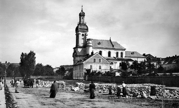 Монастир сакраменток на початку ХХ ст.